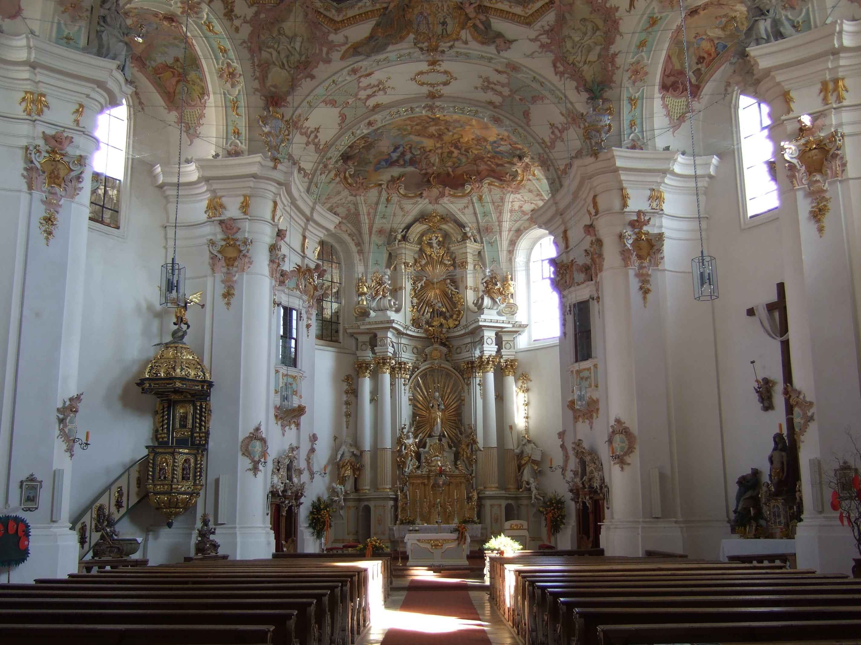 Klosterkirche des ehemaligen Benediktinerklosters Frauenzell im Bayerischen Wald